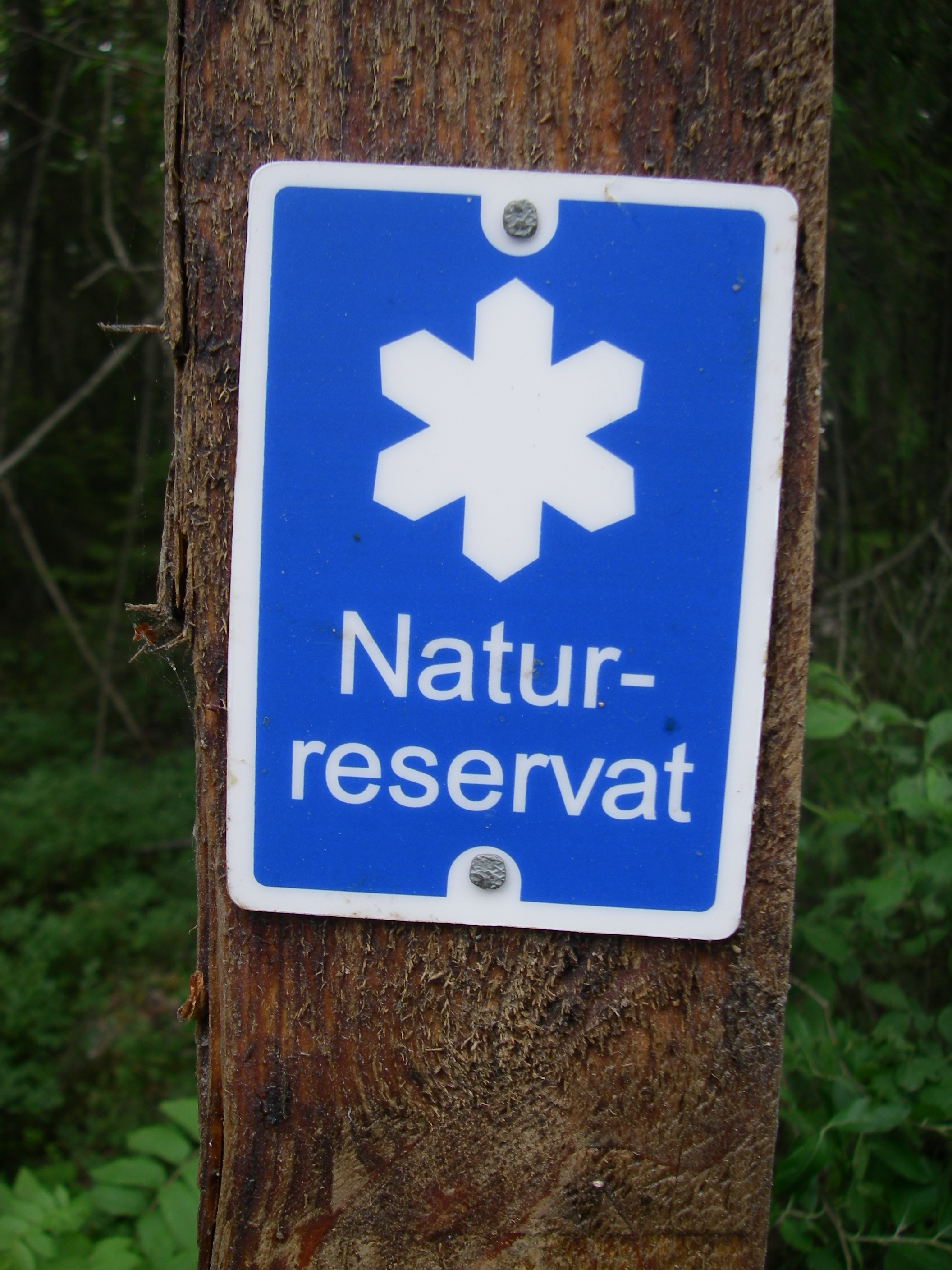 Skylt Naturreservat